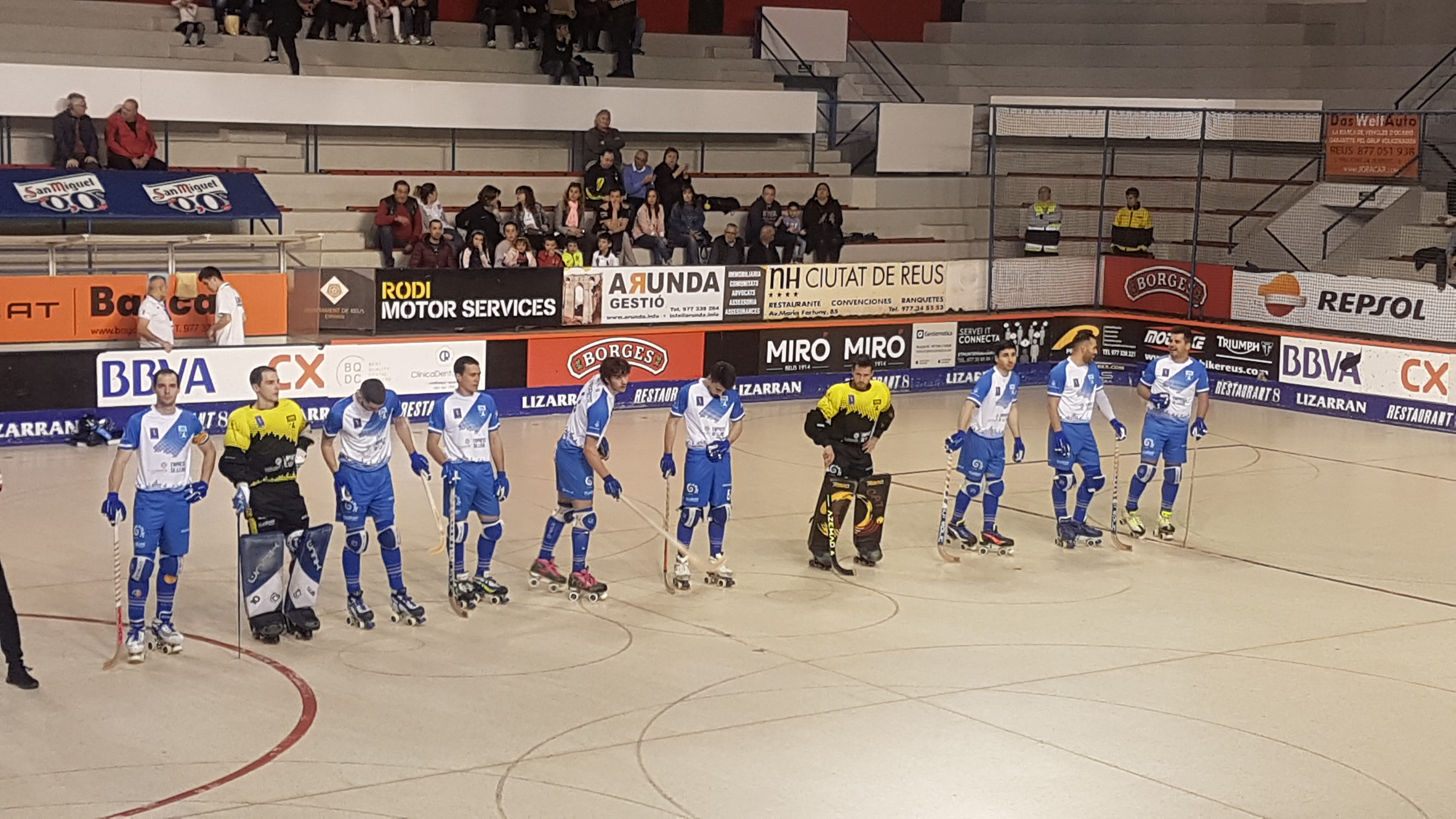 Plantilla Club Esportiu Lleida Llista Blava